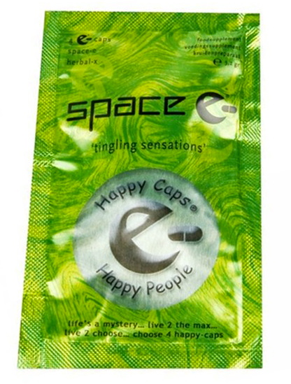 Das bewusstseinverändernde Herbal Ecstasy Space-E des Herstellers Happy Caps